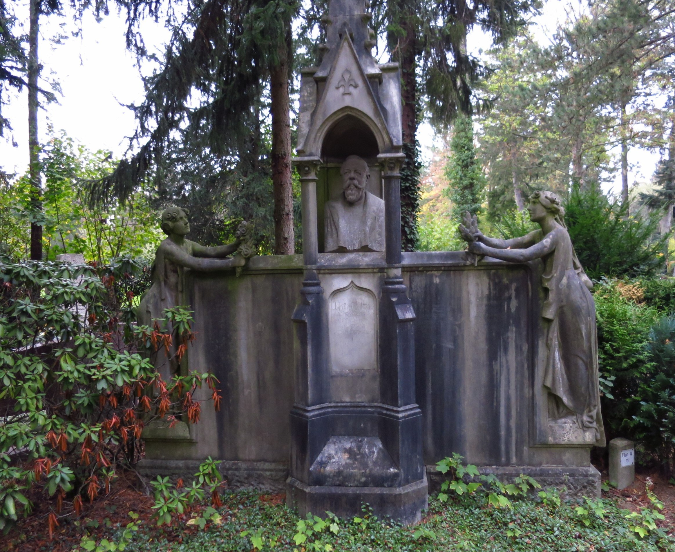 Johannes Fastenrath - Grab Westfriedhof Köln